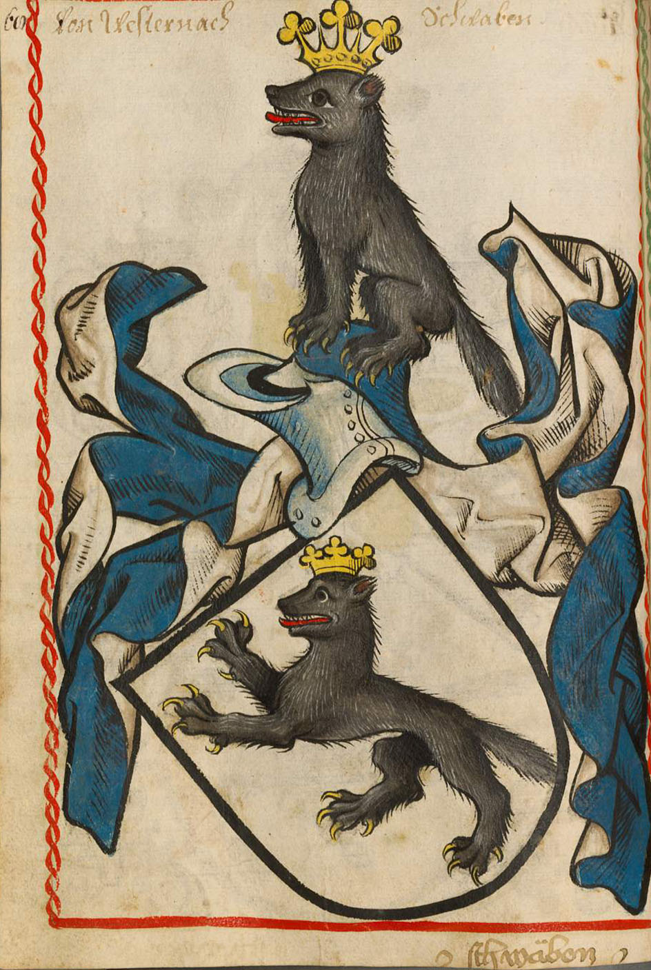 Scheibler'sches Wappenbuch, älterer Teil Wappen der Familie Westernach.